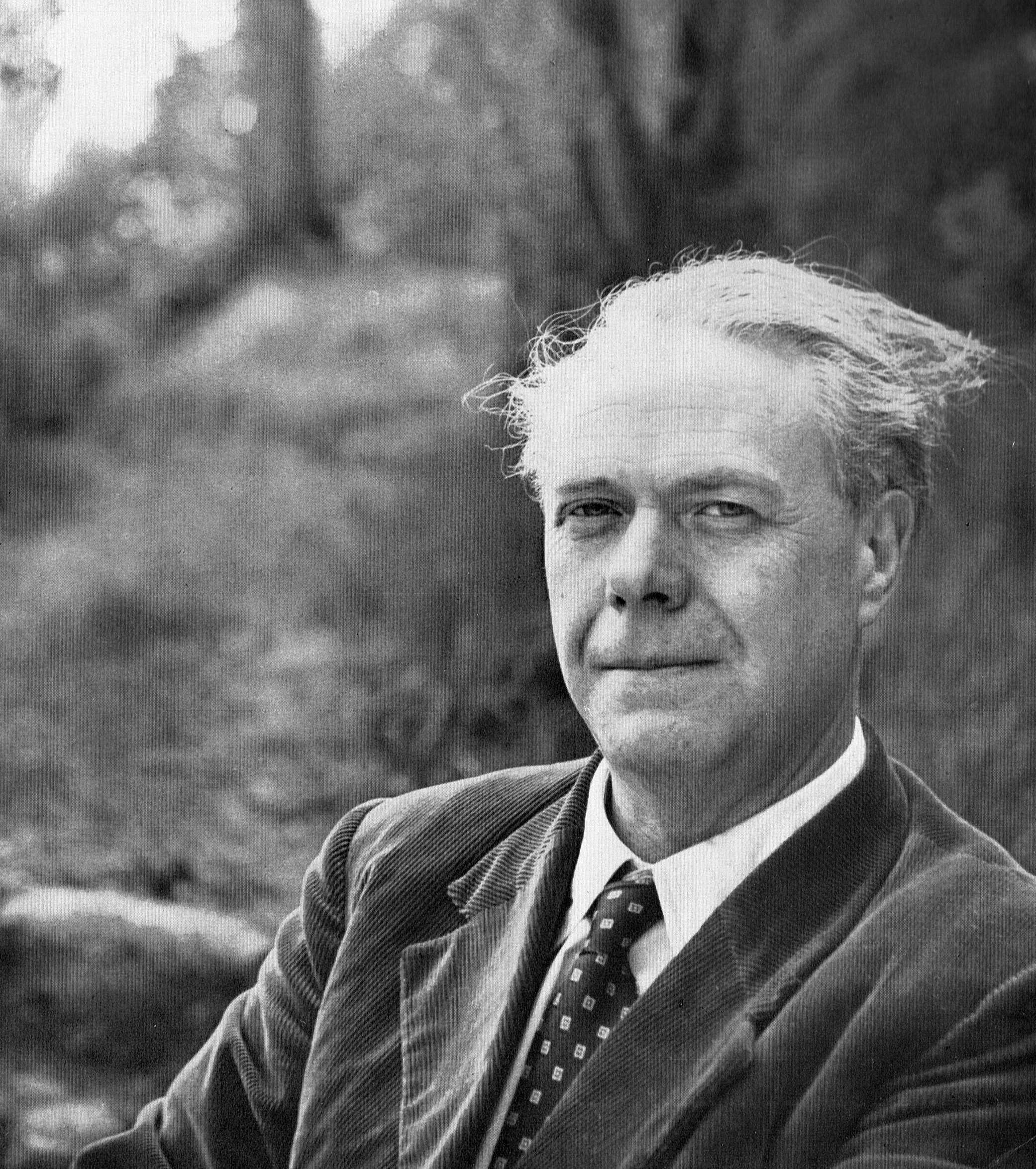 Johannes Edfelt (1904-1997)